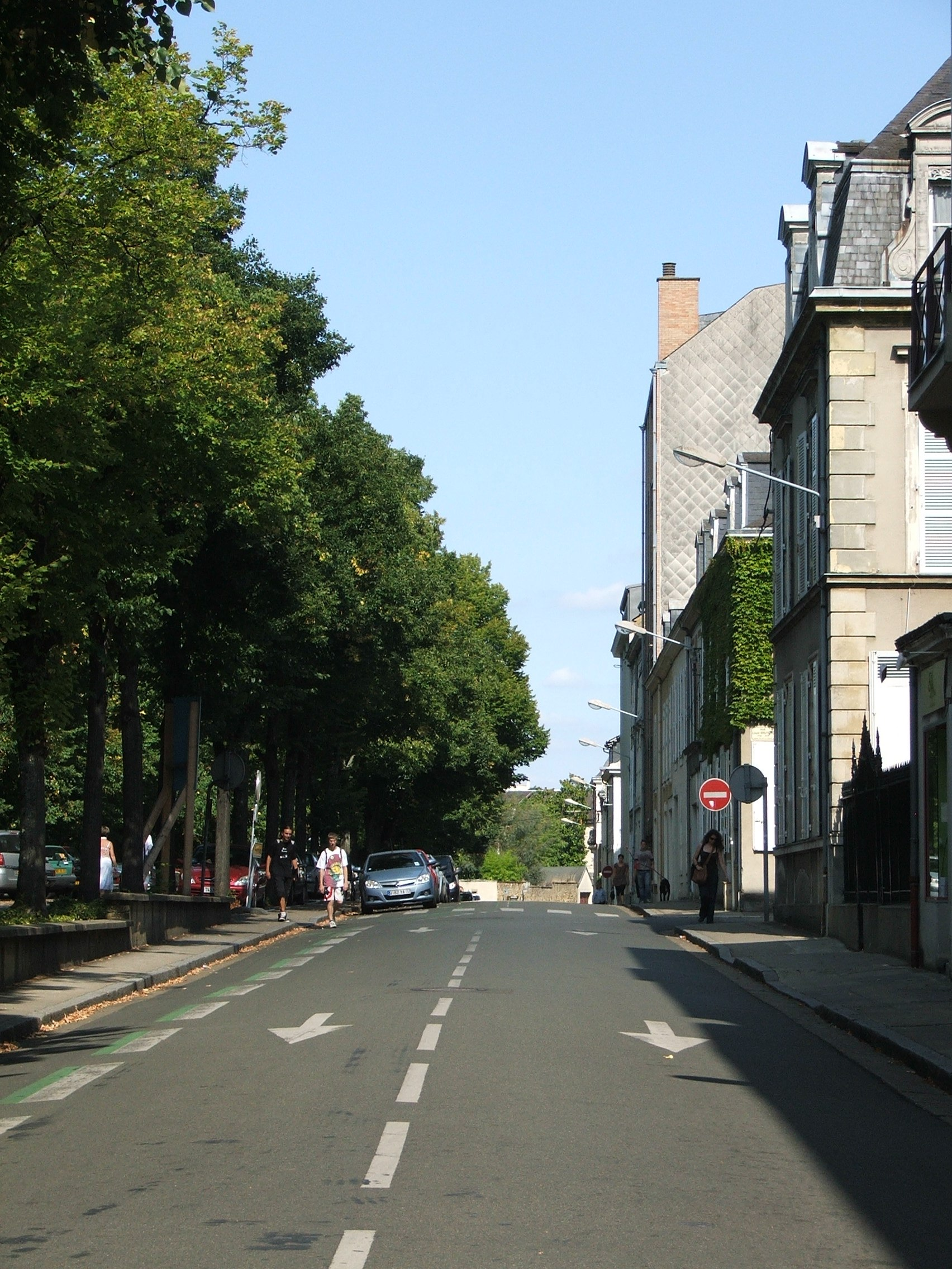 La rue du cirque au Mans, ancien lieu des arènes gallo-romaines de la ville